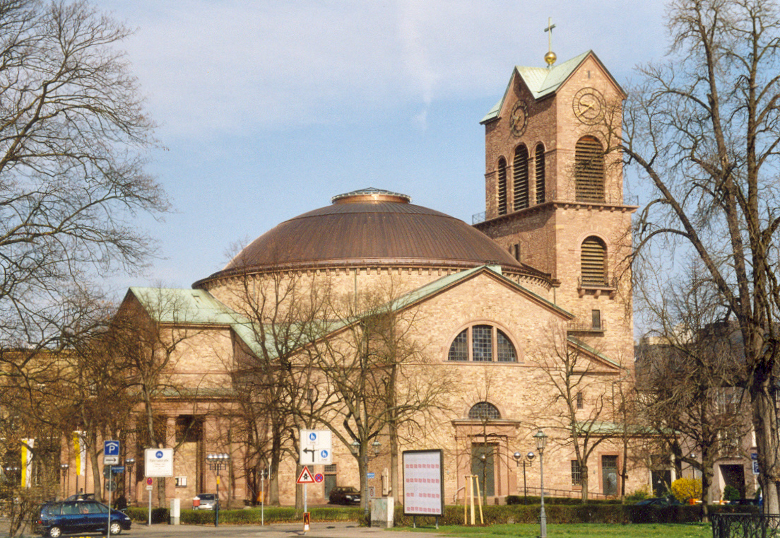 Gesamtansicht (Ostseite) der katholischen Kirche St.Stephan in Karlsruhe, entworfen und ausgeführt 1808-14 durch Badens Oberbaudirektor Friedrich Weinbrenner. St. Stephan zeigt eine originelle Interpretation des antiken römischen Pantheons.